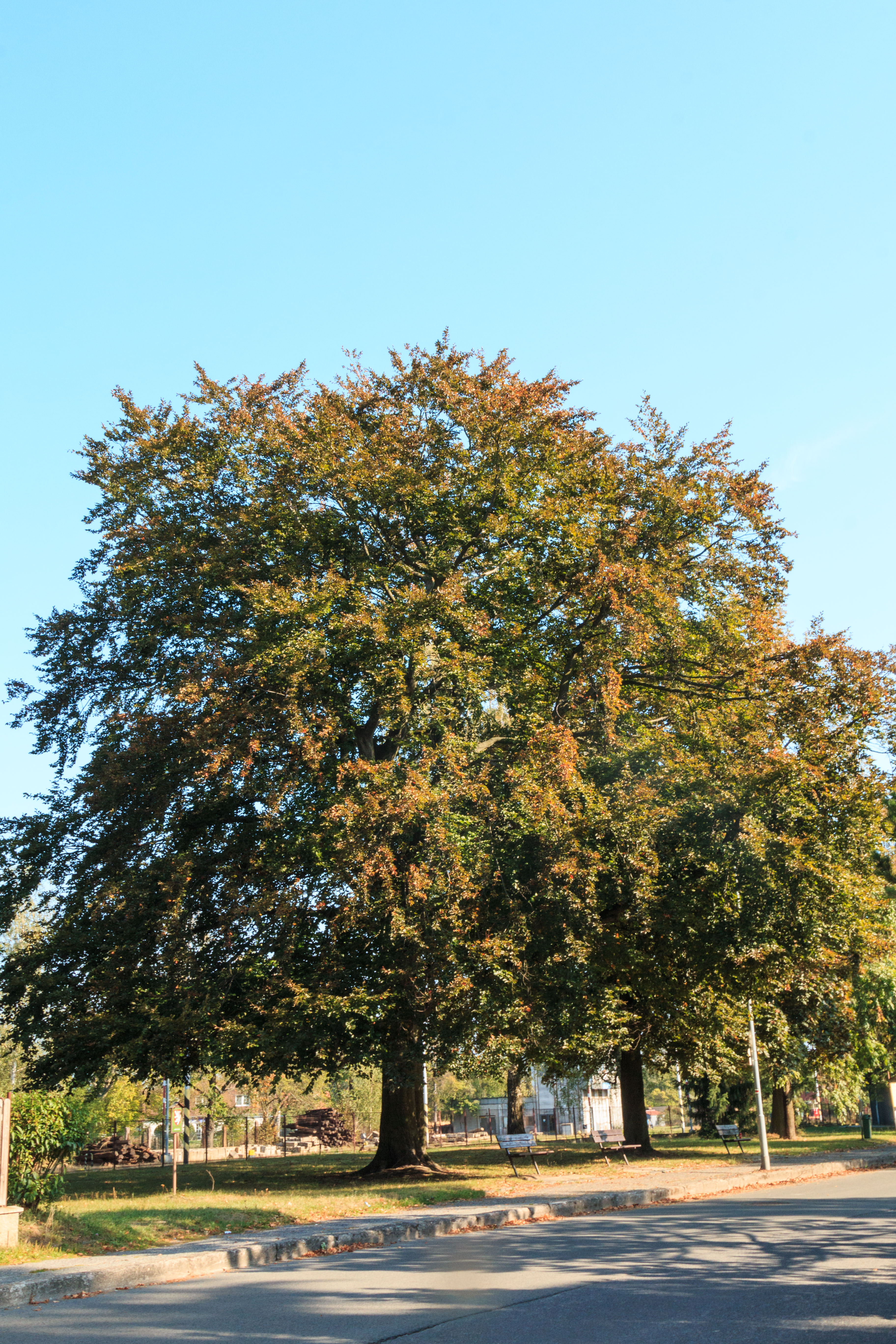 Památný buk v Mimoni Project: Vodstvo.